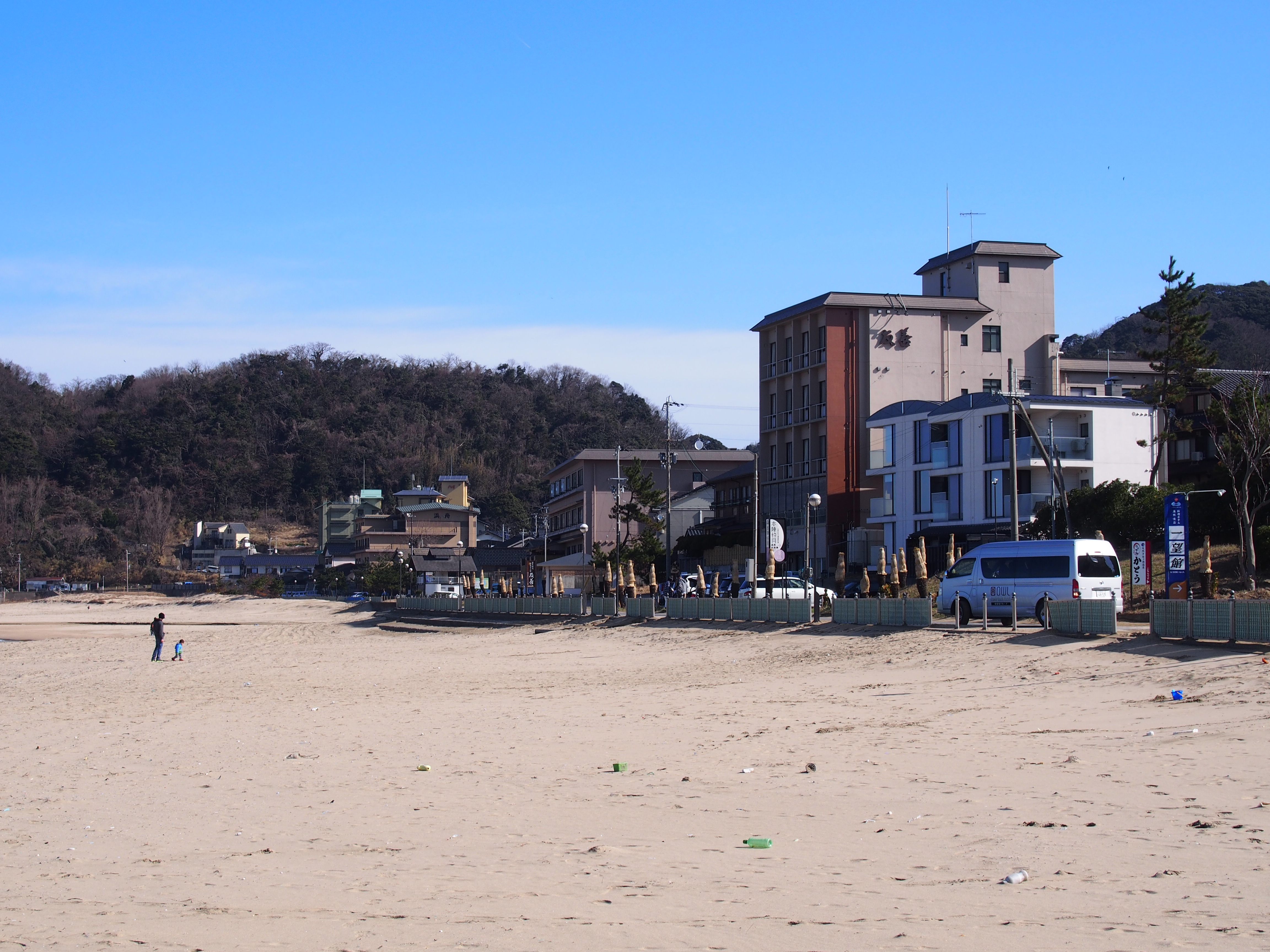 夕日ヶ浦（京都府京丹後市網野町浜詰）の旅館街 Olympus E-PL5